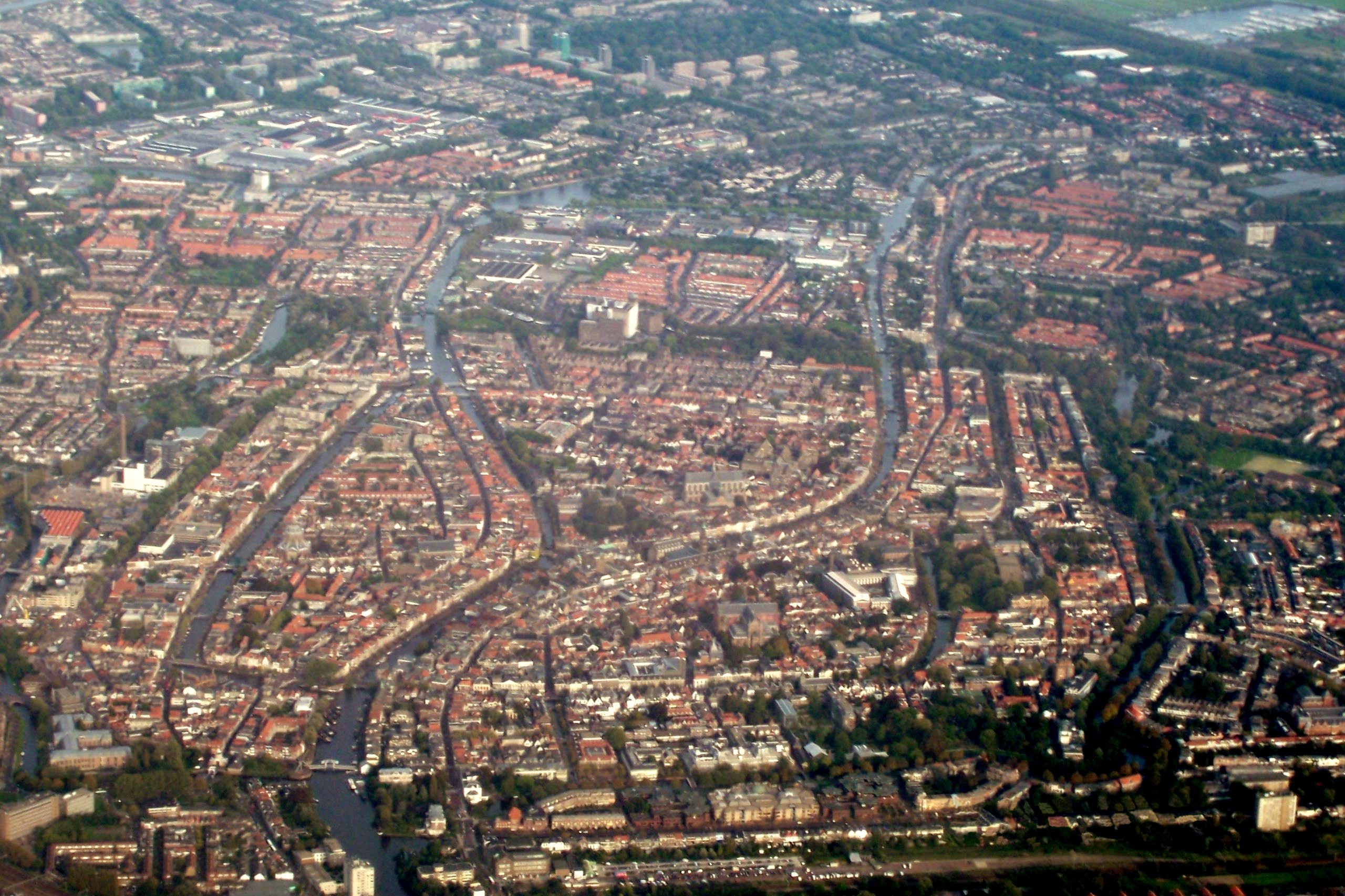 Luchfoto van het centrum van Leiden